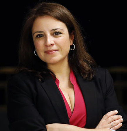 Adriana Lastra en enero de 2019, para una entrevista del periódico eldiario.es